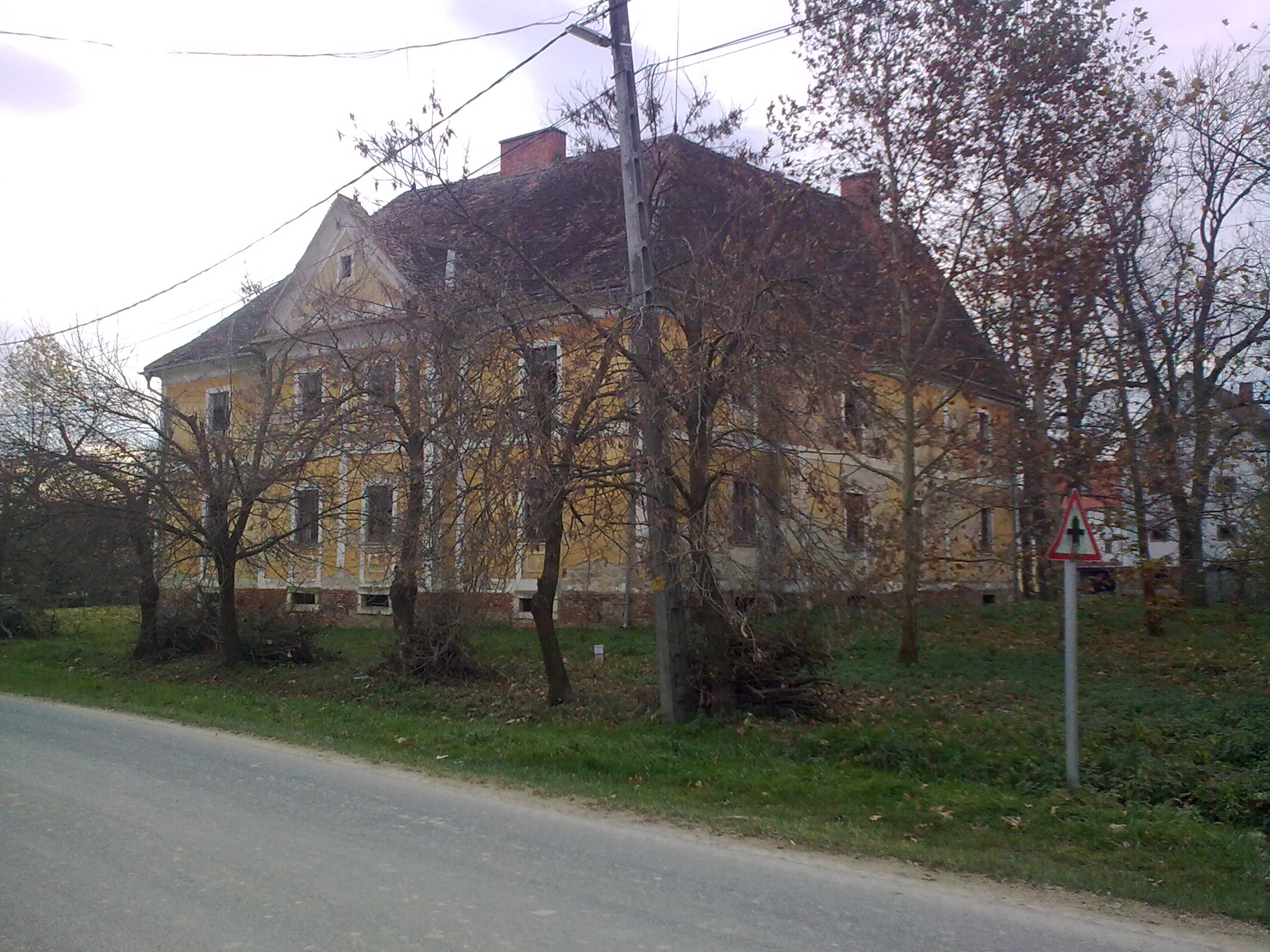 Kastély